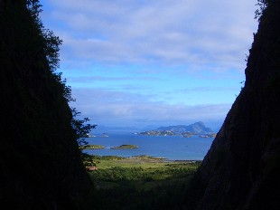 Utsikt fra Bolgbørra, hullet gjennom fjellet på Bolga, Nordland